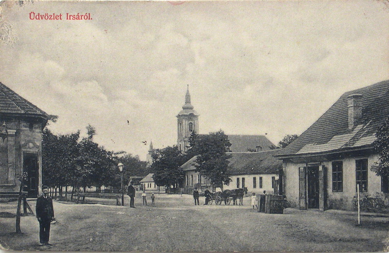 "Üdvözlet Irsáról" képeslap, háttérben az Urunk színeváltozása katolikus templom